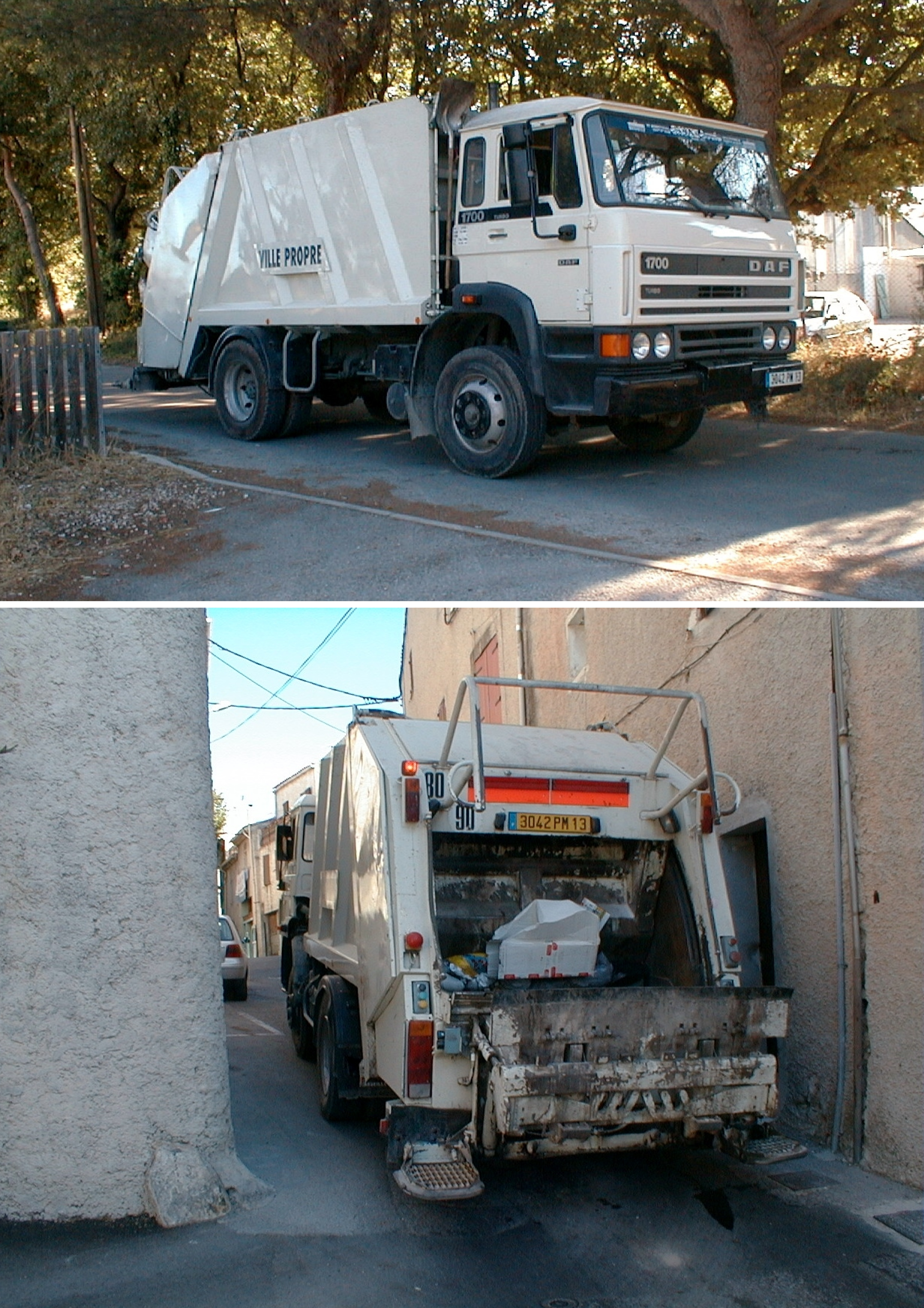 Eguilles 13510